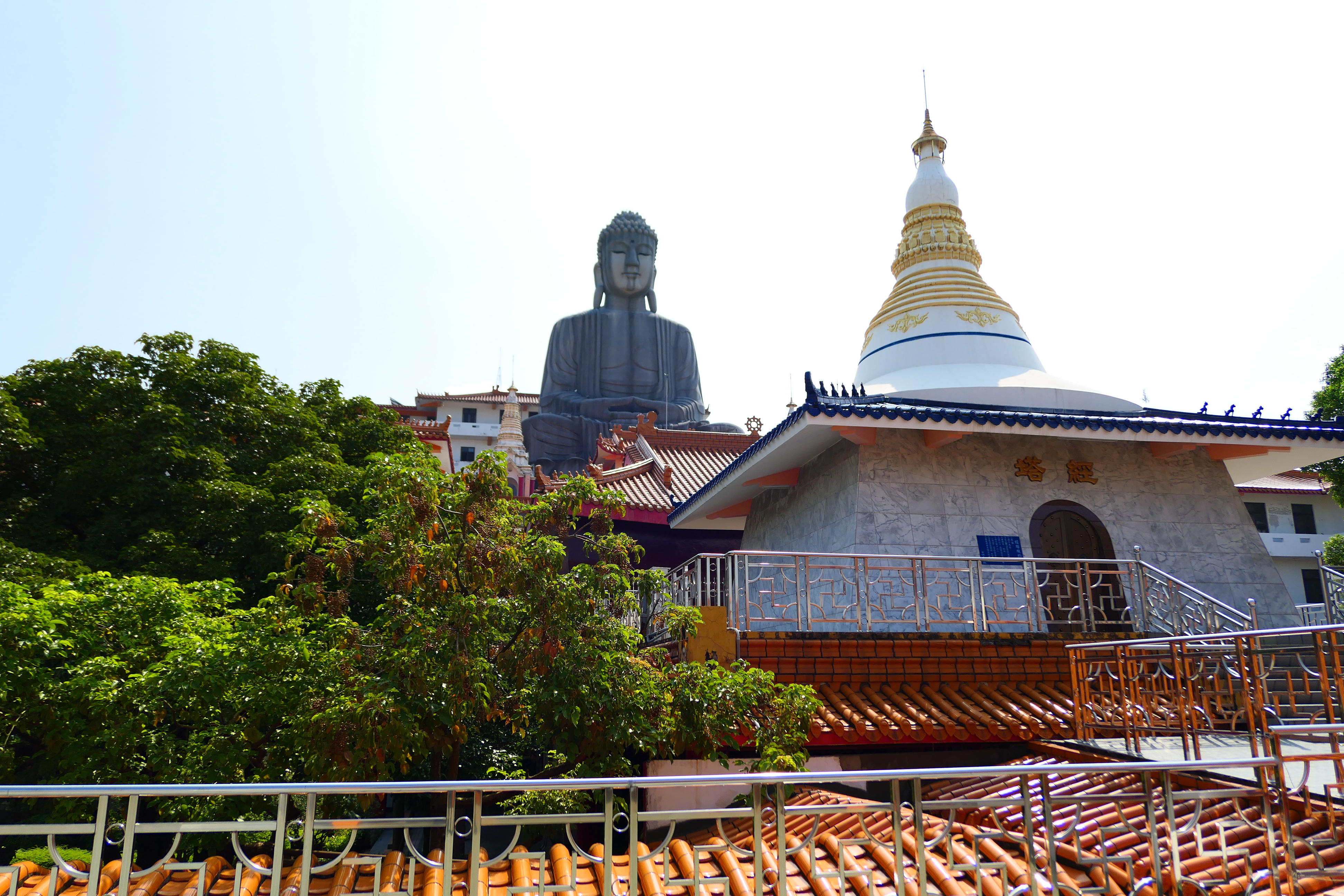 千佛山菩提寺大佛與經塔